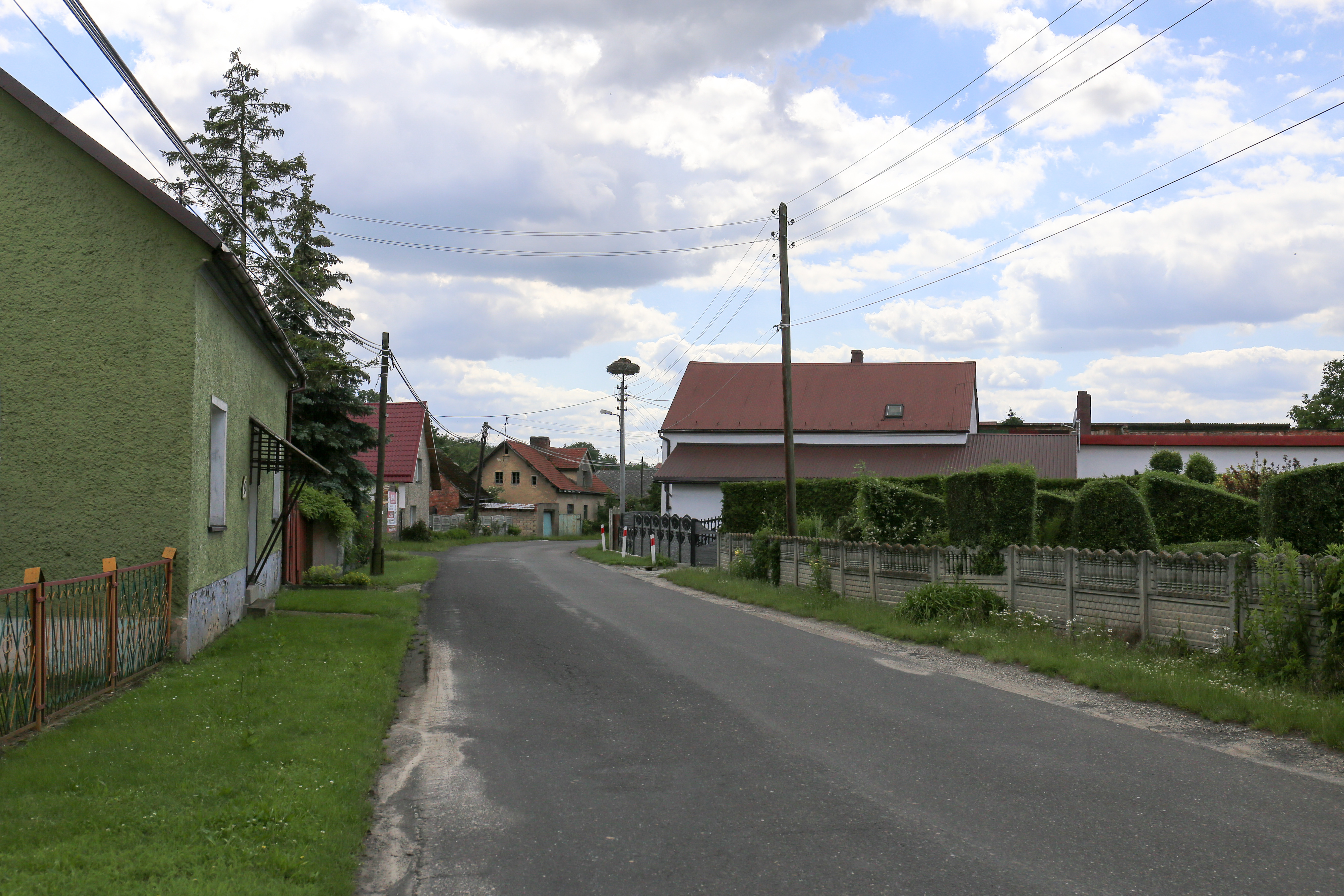 Sułków - wieś w Polsce położona w województwie opolskim, w powiecie głubczyckim, w gminie Baborów.